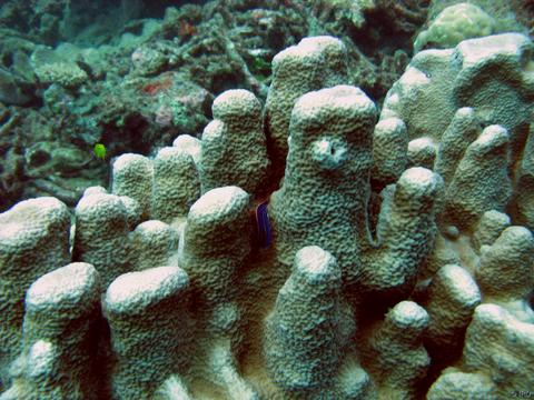 Psammocora digitata, in situ, Nueva Caledonia.